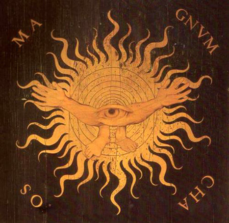 Scansione da libro di una fotografia di una tarsia lignea del coro della Basilica di Santa Maria Maggiore a Bergamo, opera di Giovan Francesco Capoferri su disegno di Lorenzo Lotto. L'opera d'arte ritratta è di pubblico dominio.